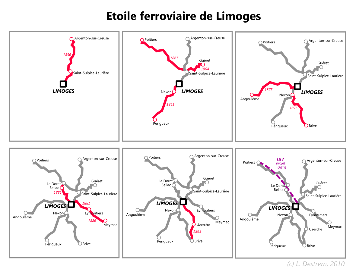 Carte de l'étoile ferroviaire de Limoges, et de sa constitution